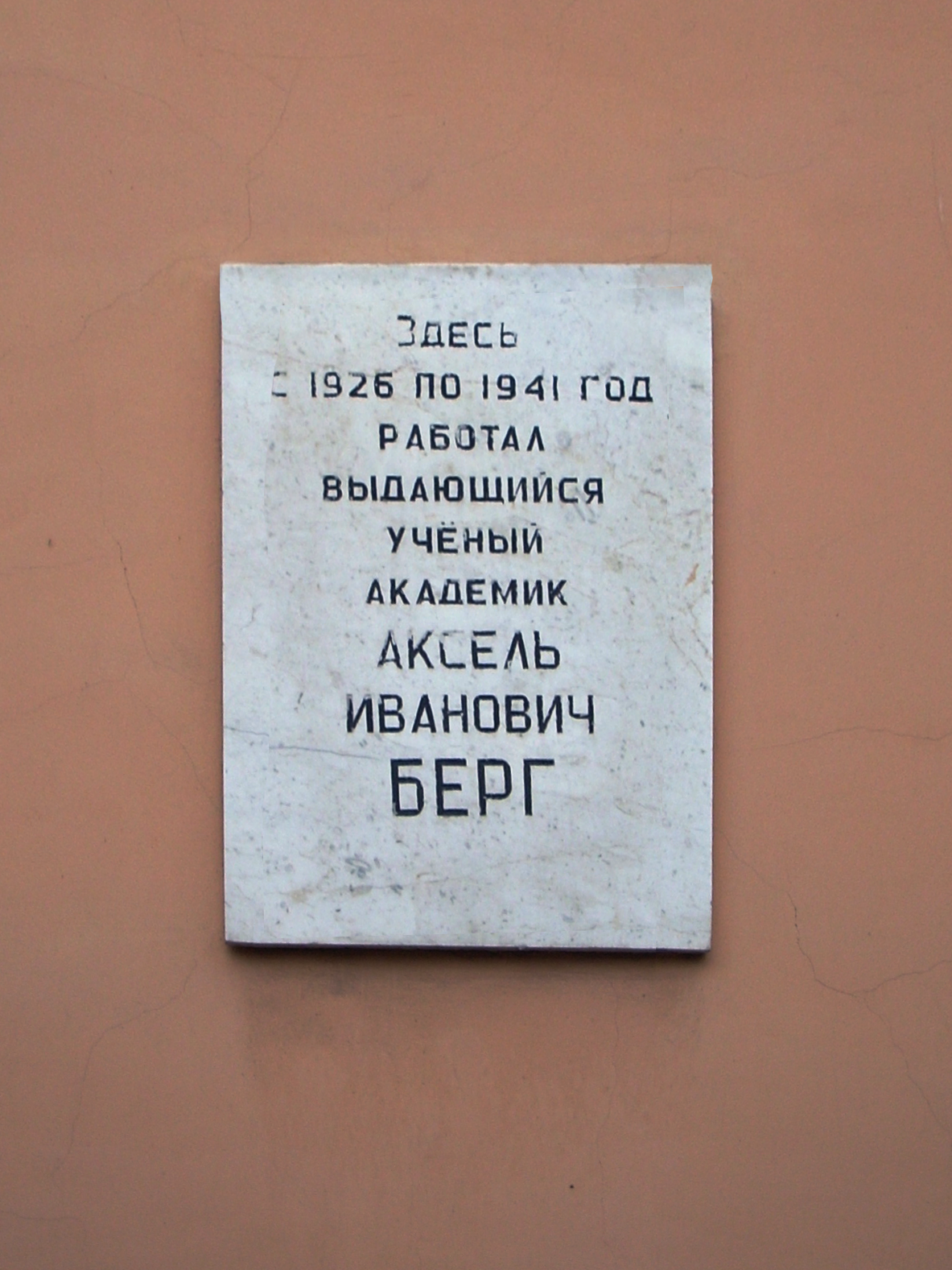 Мемориальная табличка на стене СПбГЭТУ "ЛЭТИ"